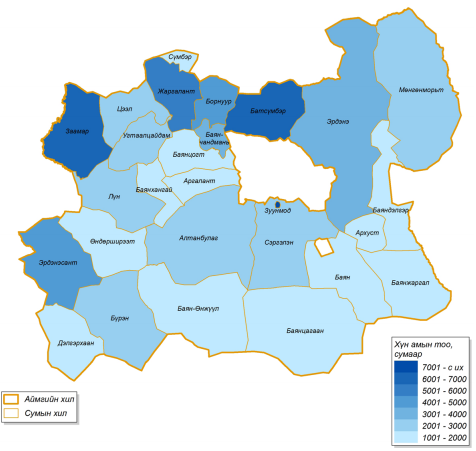 Монгол: Төв аймгийн хүн амын суурьшил, сумаар - 2010 оны хүн амын тооллогын дүн.